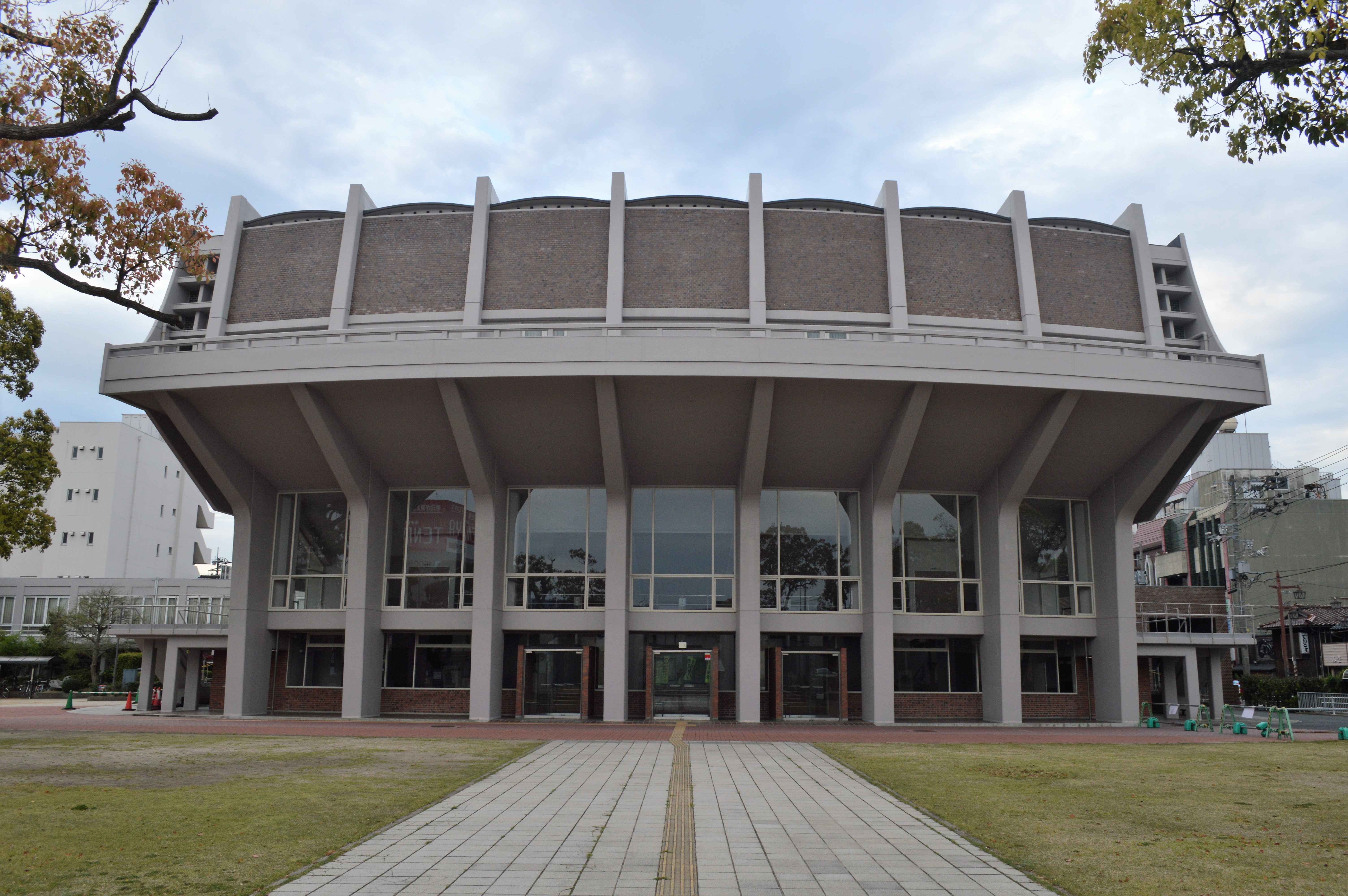 鳥取県米子市の米子市公会堂。